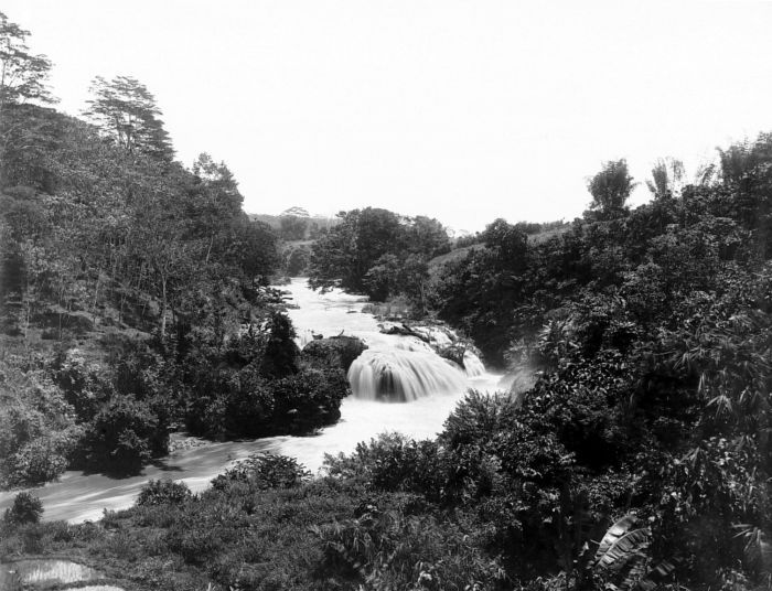 Negatief. Waterval van de Brantasrivier, gelegen in het oewoud van Java. Lyn Malang-Blitar. Waterval van de Brantasrivier bij Kapandjen (res. Pasoeroean)